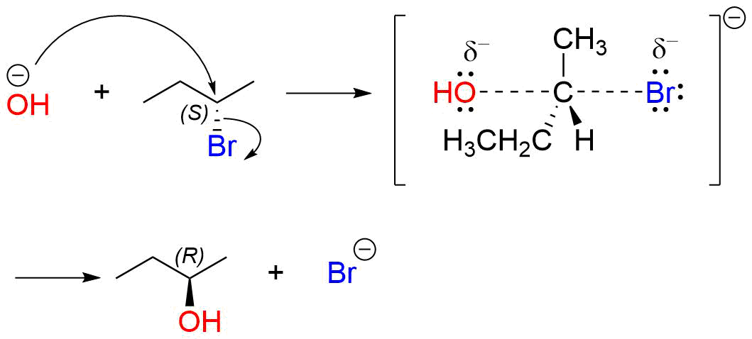 SN2-reaktio on stereospesifinen. Kiraalisen substraatin SN2-reaktio tuottaa tuotteen, jolla on vastakkainen stereokemiallinen konfiguraatio.